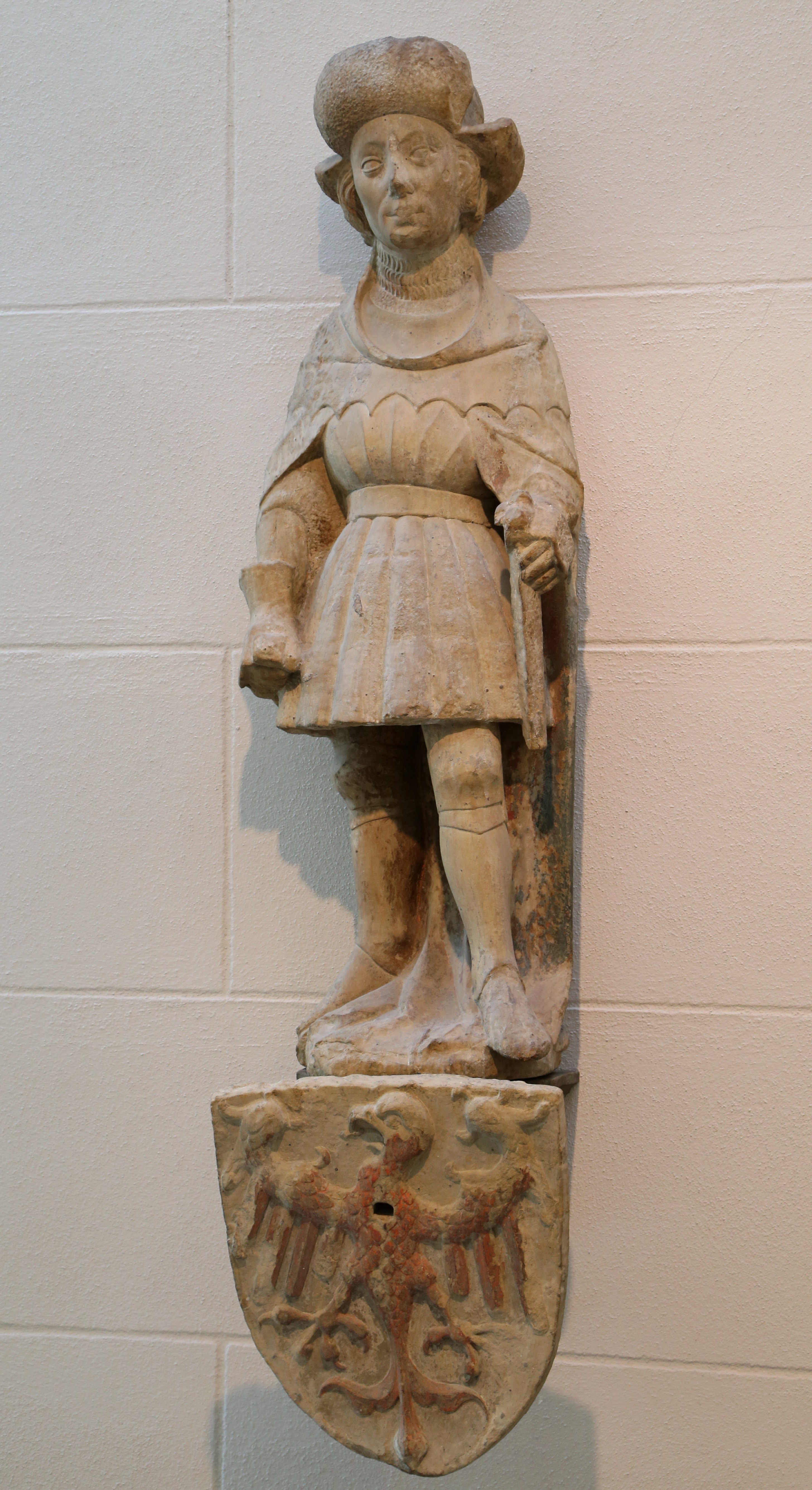 Meister Hartmann: Fünf Skulpturen, Ulm, um 1420-25 Sandstein, geringe Fassungsreste; Ulmer Museum v.l.n.r. Der Markgraf von Brandenburg Der Herzog von Sachsen Der Pfalzgraf bei Rhein Der Erzbischof von Trier Der Erzbischof von Köln Meister Hartmann Description German sculptor Date of birth/deathUnknown dateUnknown dateWork periodcirca 1420Work locationUlmAuthority control GND: 129416924 WP-Person